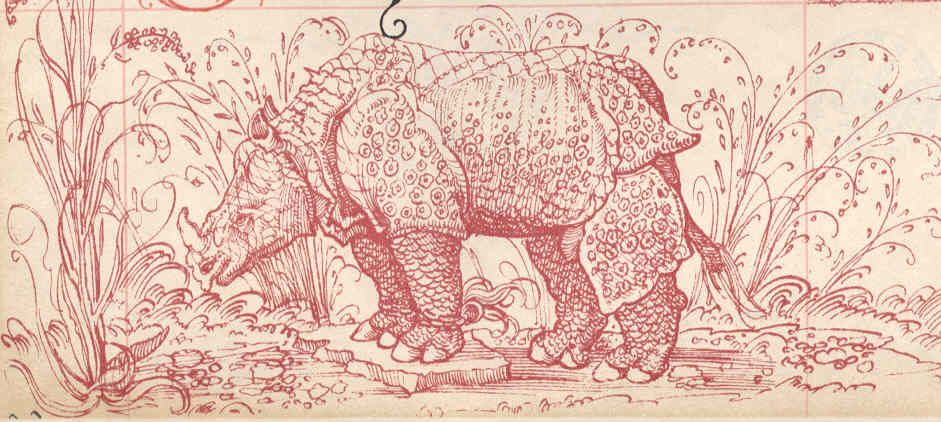 Kaiser Maximilians I. Gebetbuch (1515; Detail); Giehlowscher Faksimiledruck ; Wien 1907 Laut später eingefügter Signatur ist die Zeichnung des Rhinoceros von Albrecht Altdorfer.